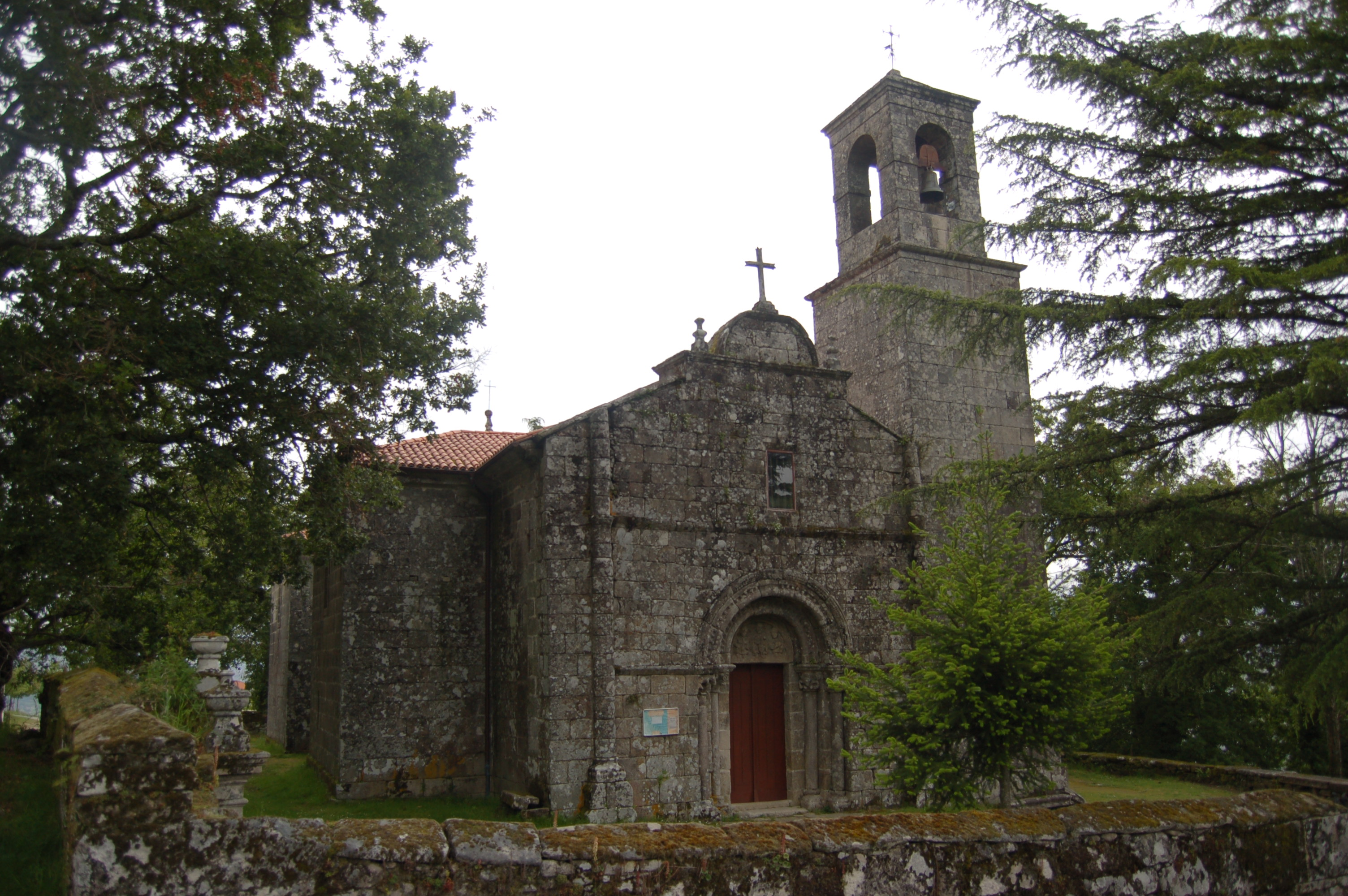 Igrexa parroquial de Santa Mariña de Fragas (Campo Lameiro)